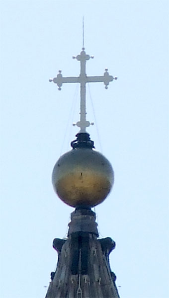 Sommità della cupola di San Pietro, Roma, Vaticano. Popolarmente detta "palla".